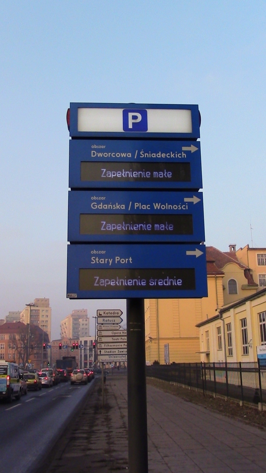 Tablica Informacyjna